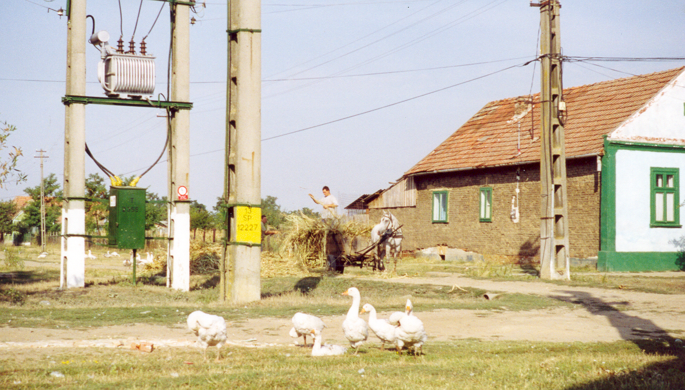 Neubeschenowa Impression 2003